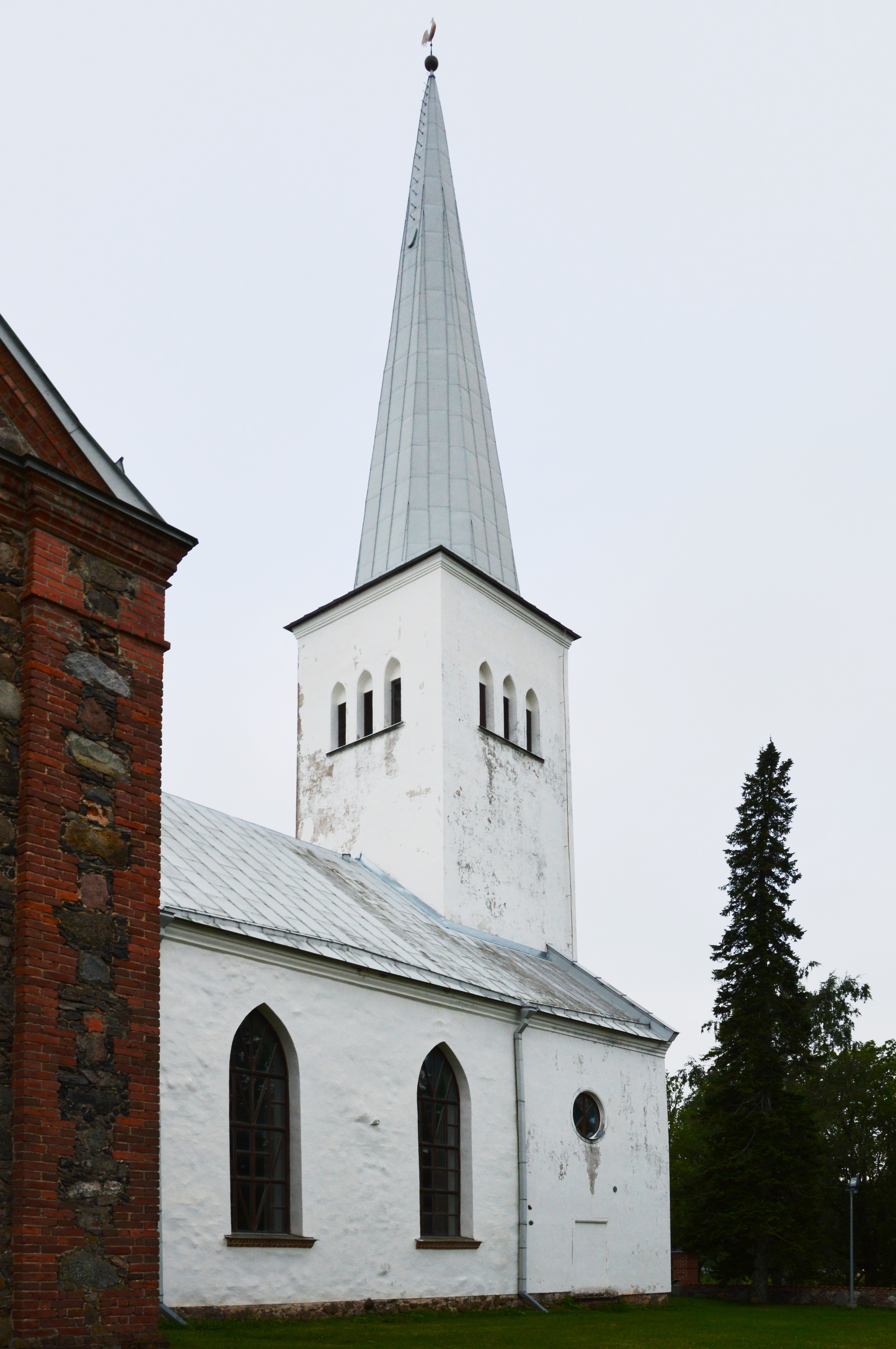 Kambja kirik